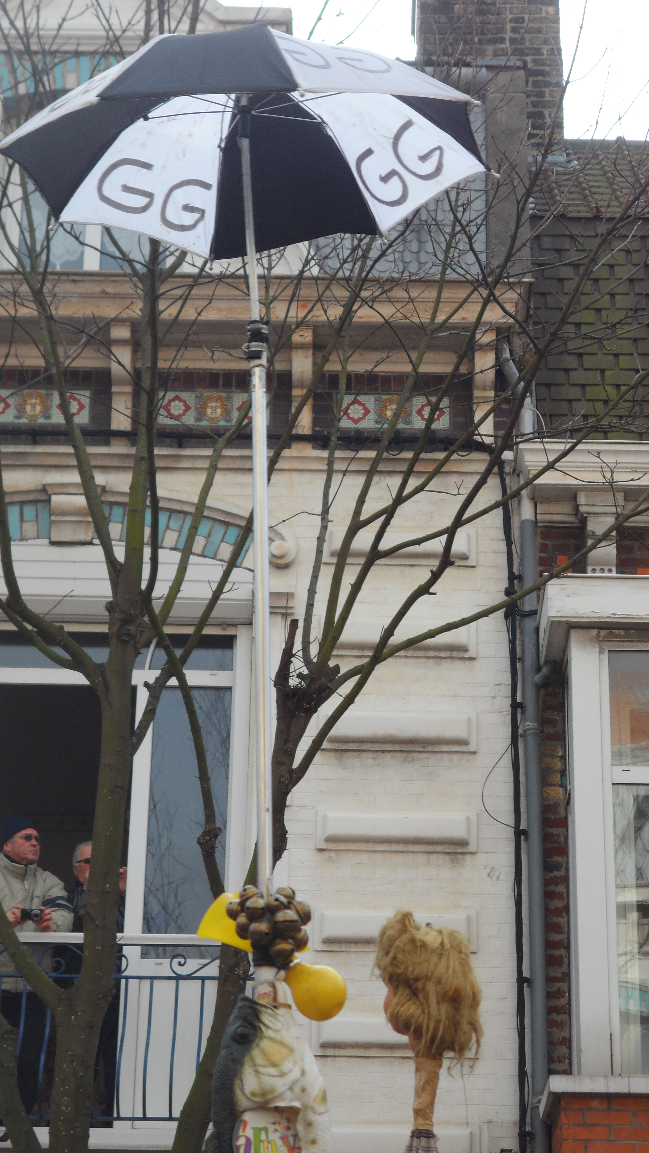 Parapluie d'un des membres de la Jeune France organisatrice du bal des Gigolos Gigolettes (GG)